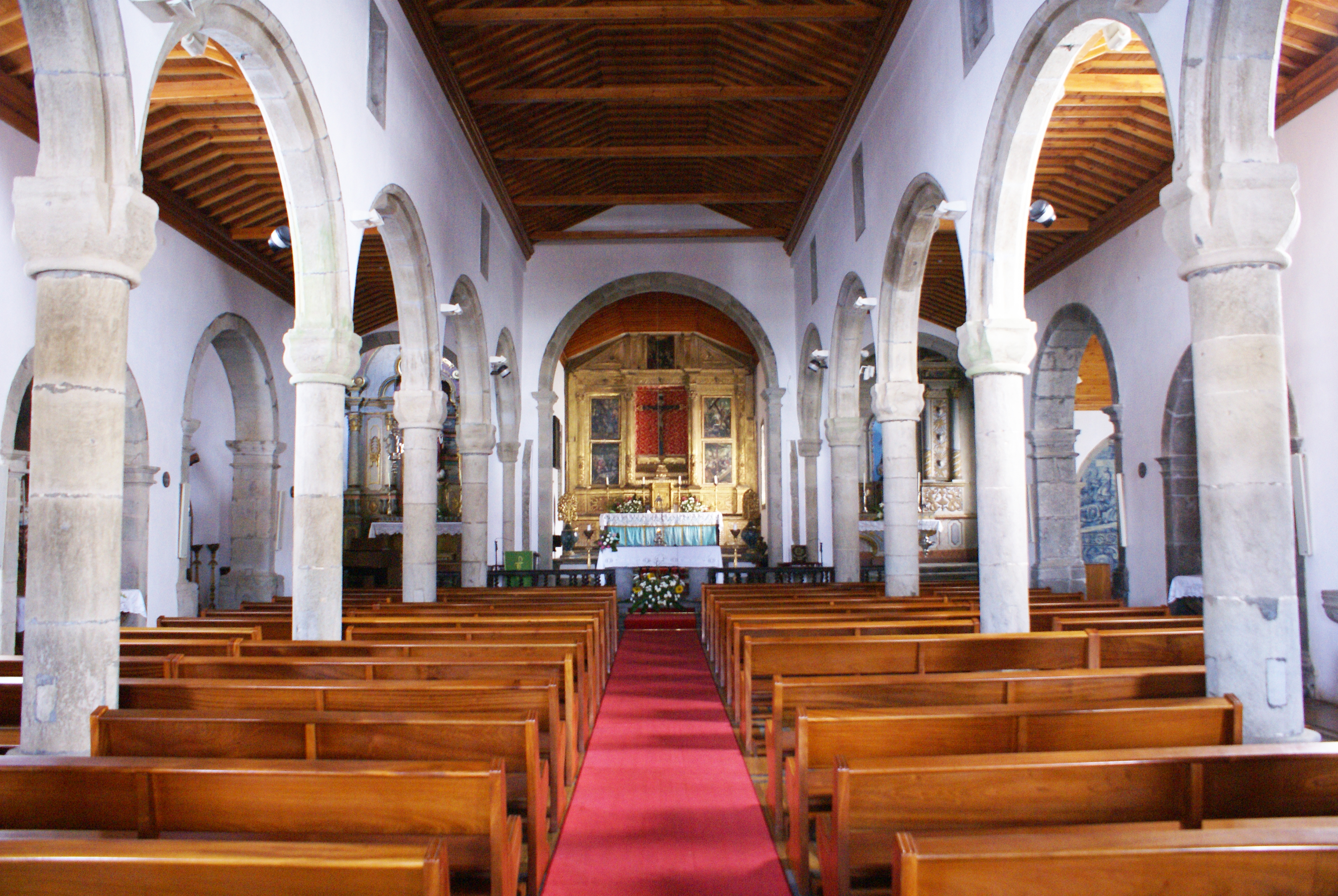 Igreja Matriz de Santa Cruz da Graciosa, nave central, Santa Cruz da Graciosa, ilha Graciosa, Açores, Portugal